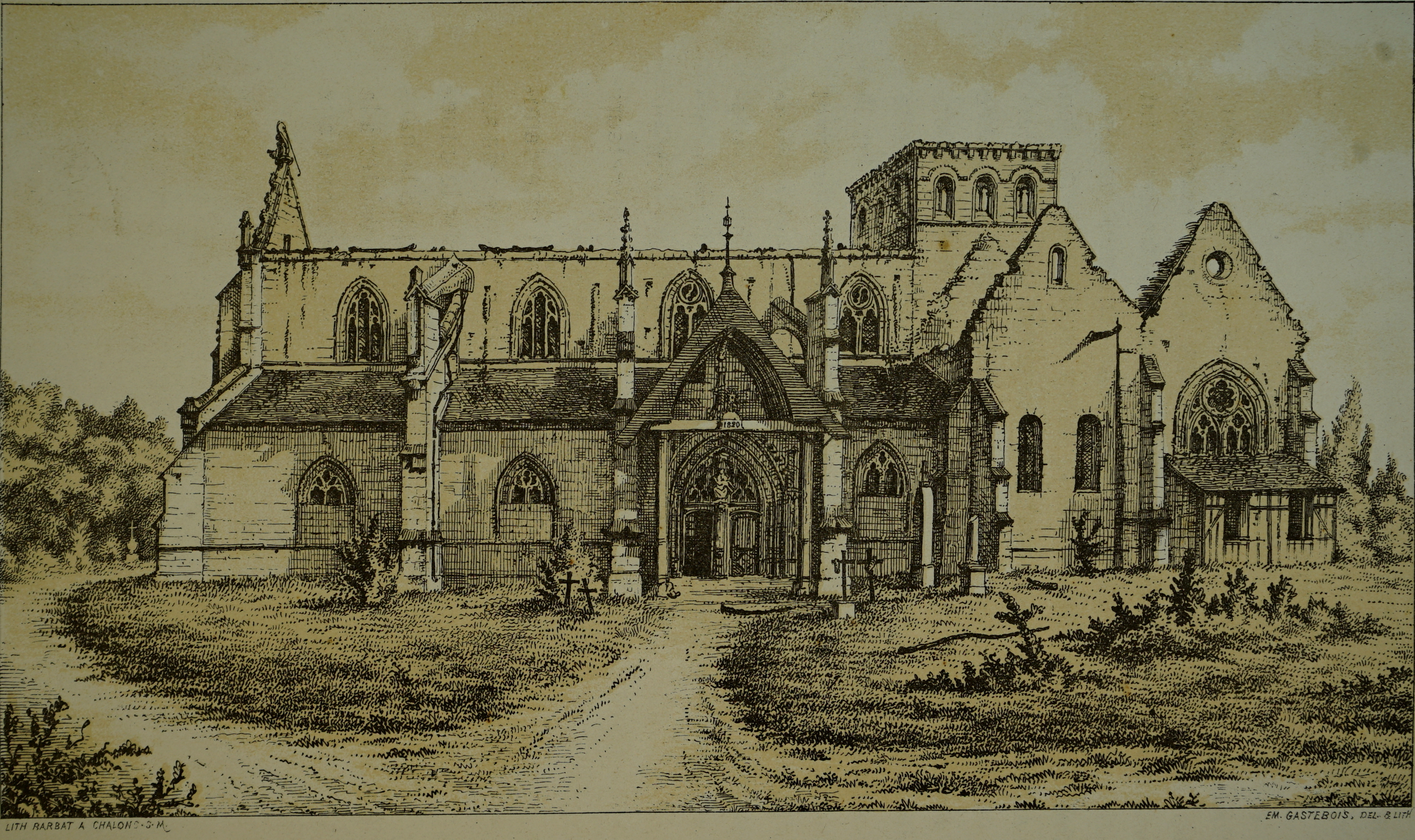 vue de l'église aprsè l'incendie de 1874.